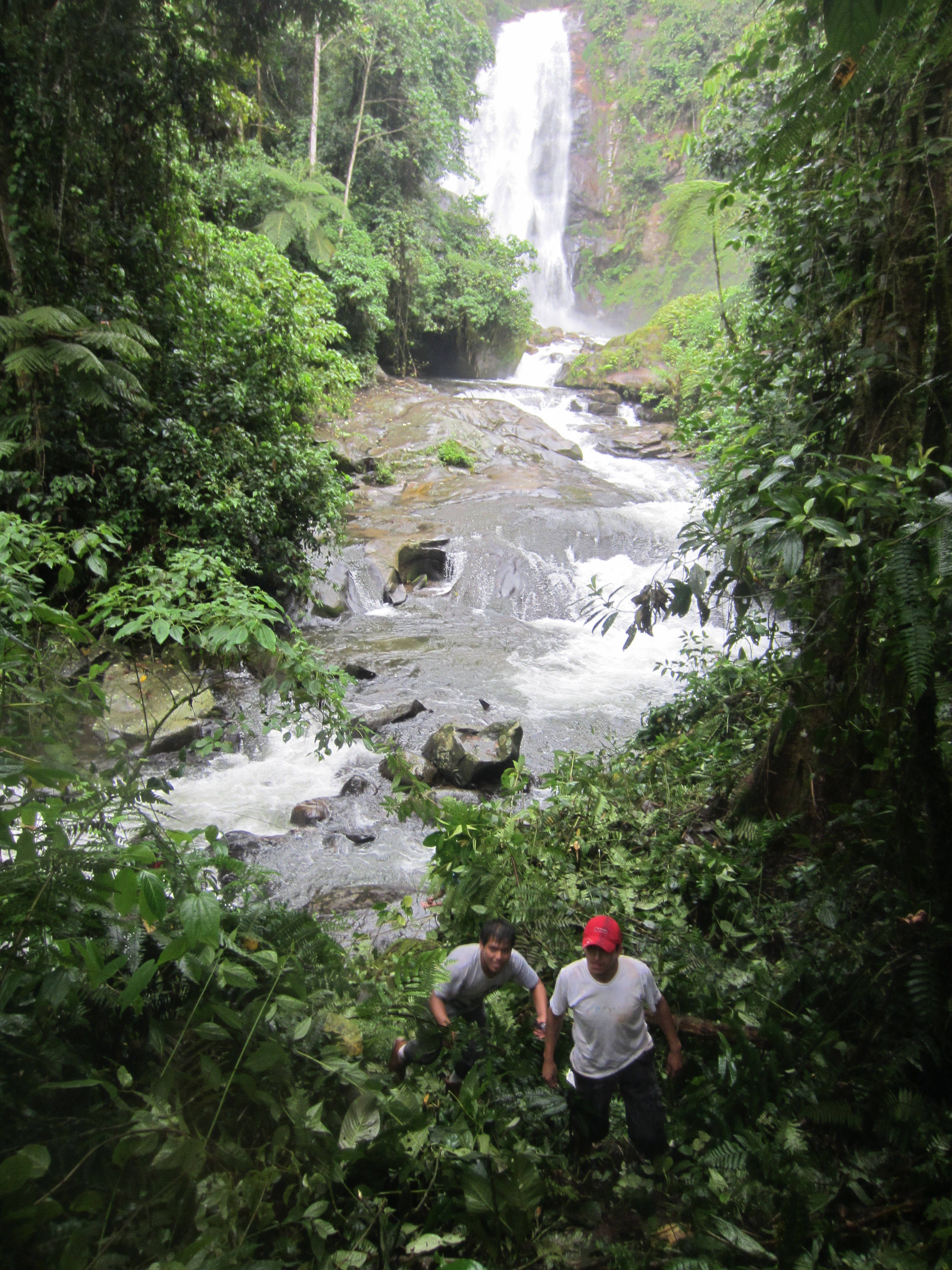 Esta ubicado en el distrito San Martin de Pangoa,Provincia de Satipo.